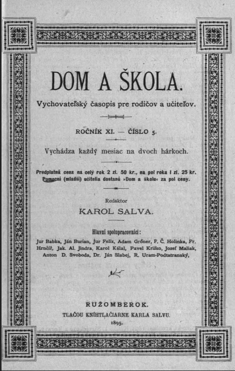 Titulný list slovenského vychovávateľského časopisu pre rodičov a učiteľov, ktorý vychádzal na Slovensku v 19. storoči.